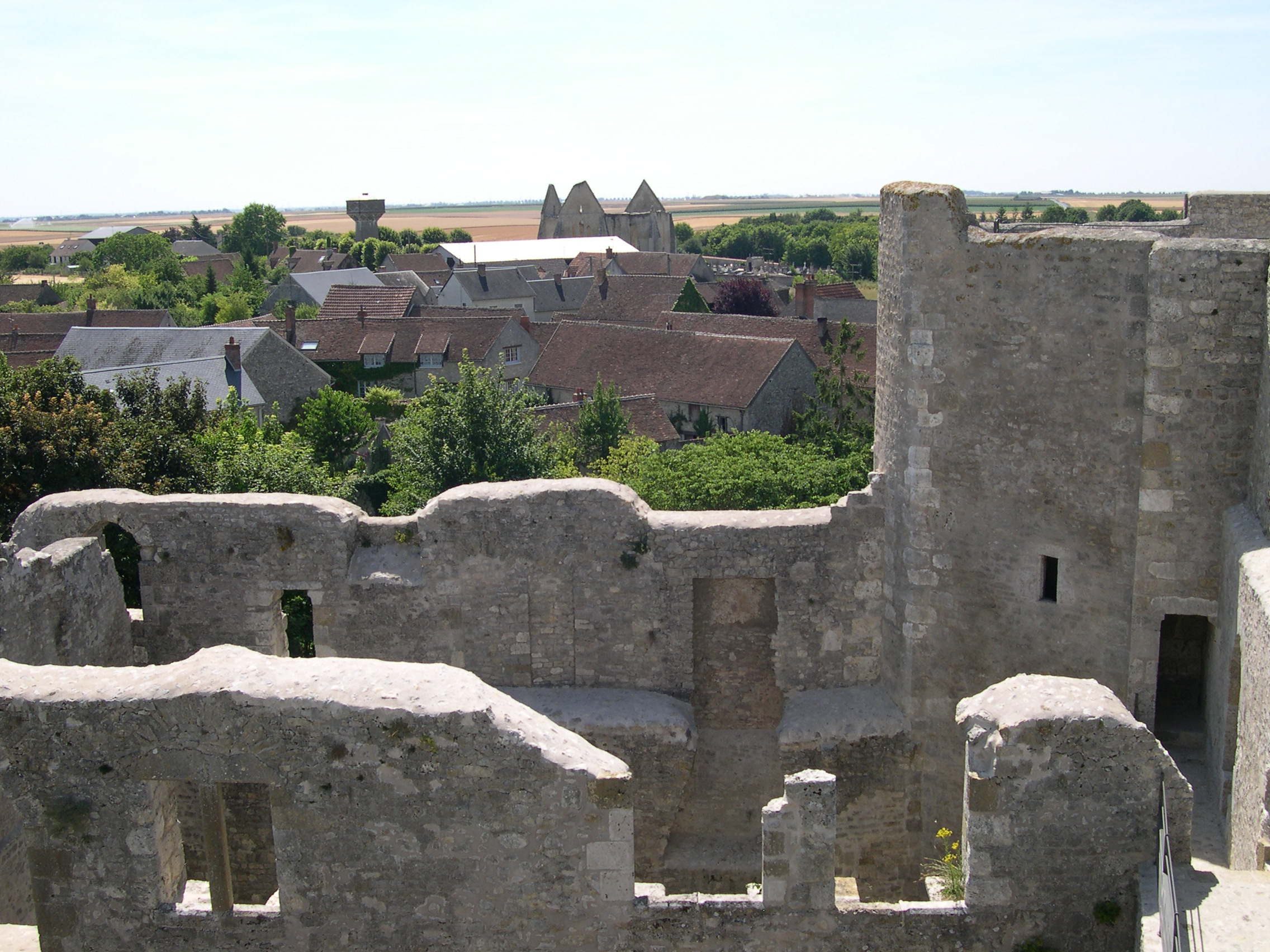 France Loiret Yèvre-le-Châtel Le château Photographie prise par GIRAUD Patrick